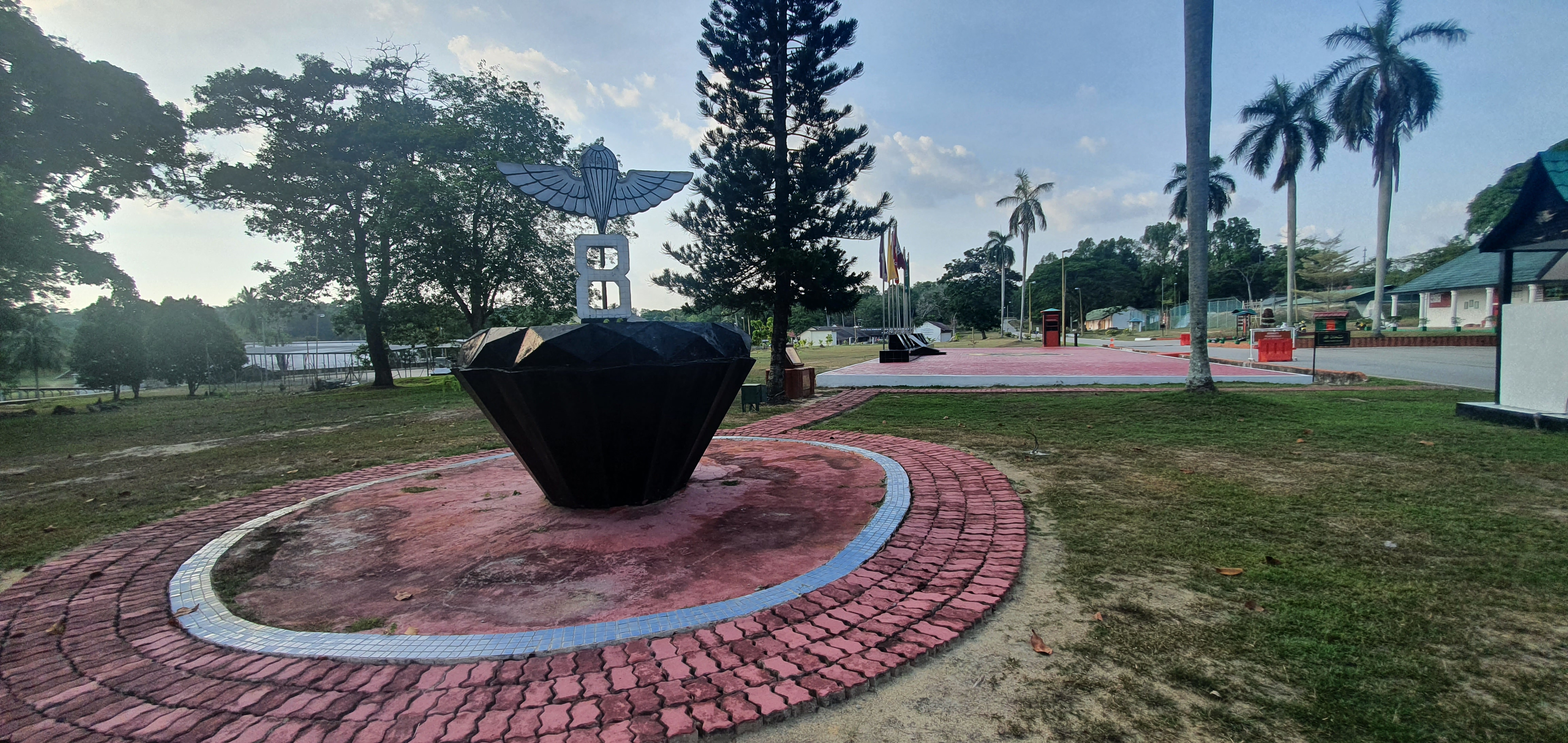 Permata Para